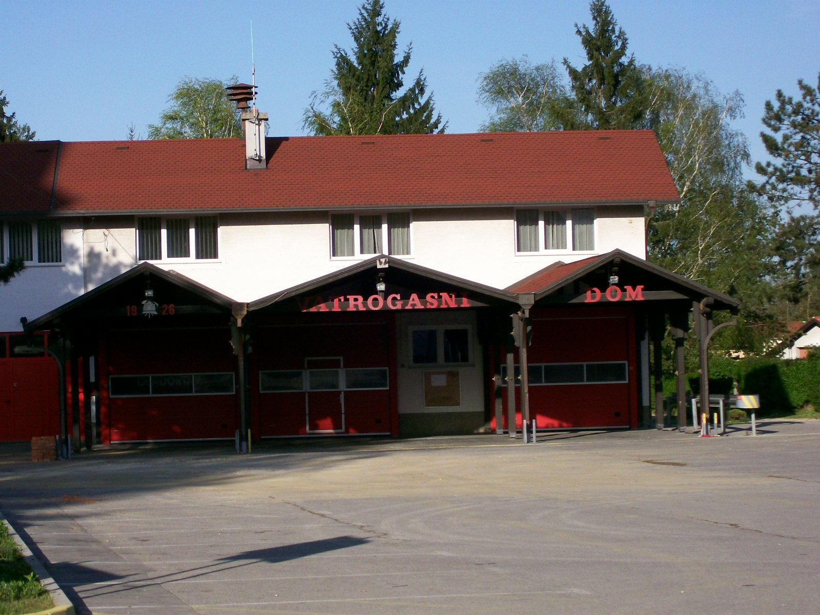 Vatrogasni dom Sveta Nedelja pokraj Zagreba